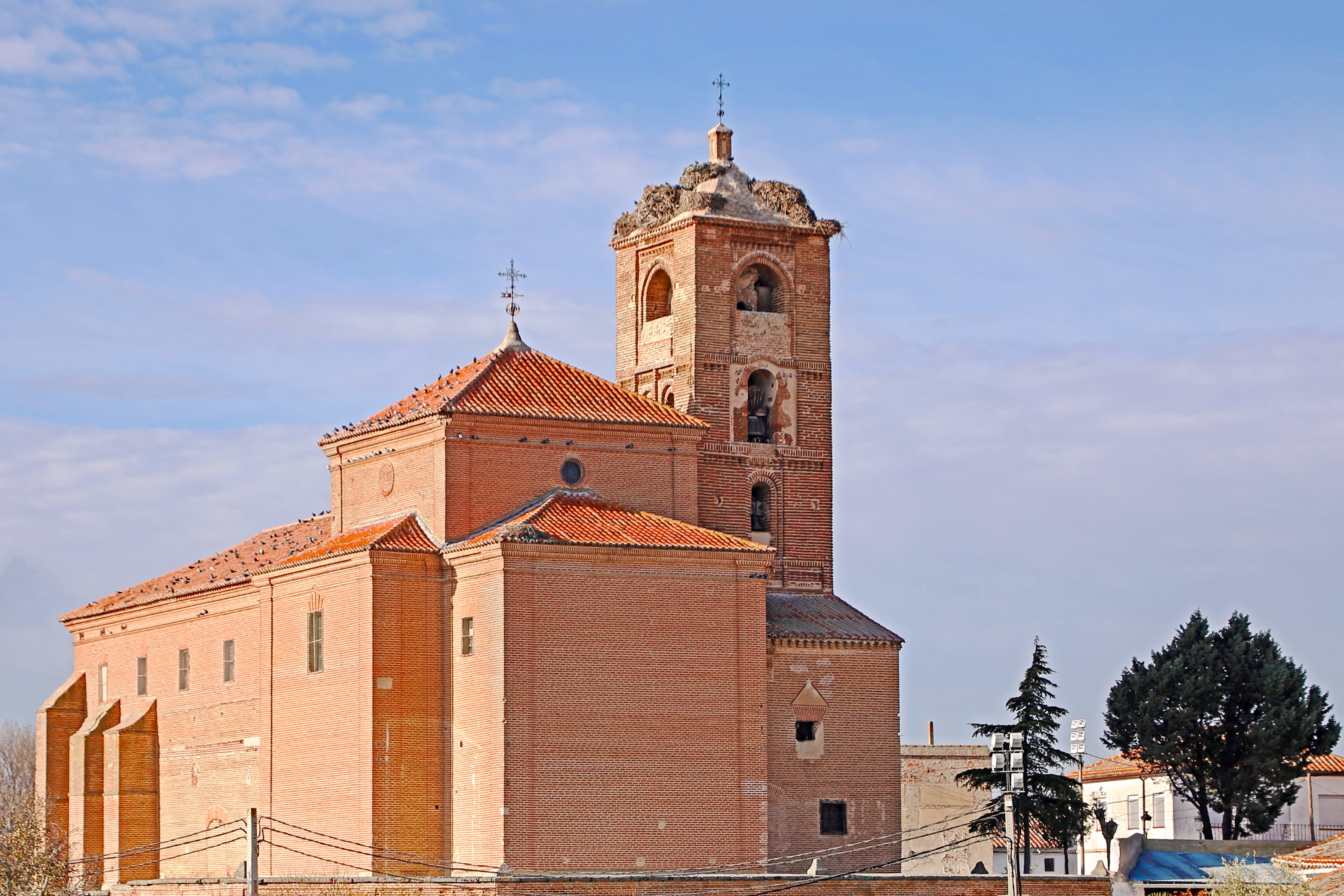 Rasueros es un municipio que pertenece a la comarca de La Moraña, provincia de Ávila.